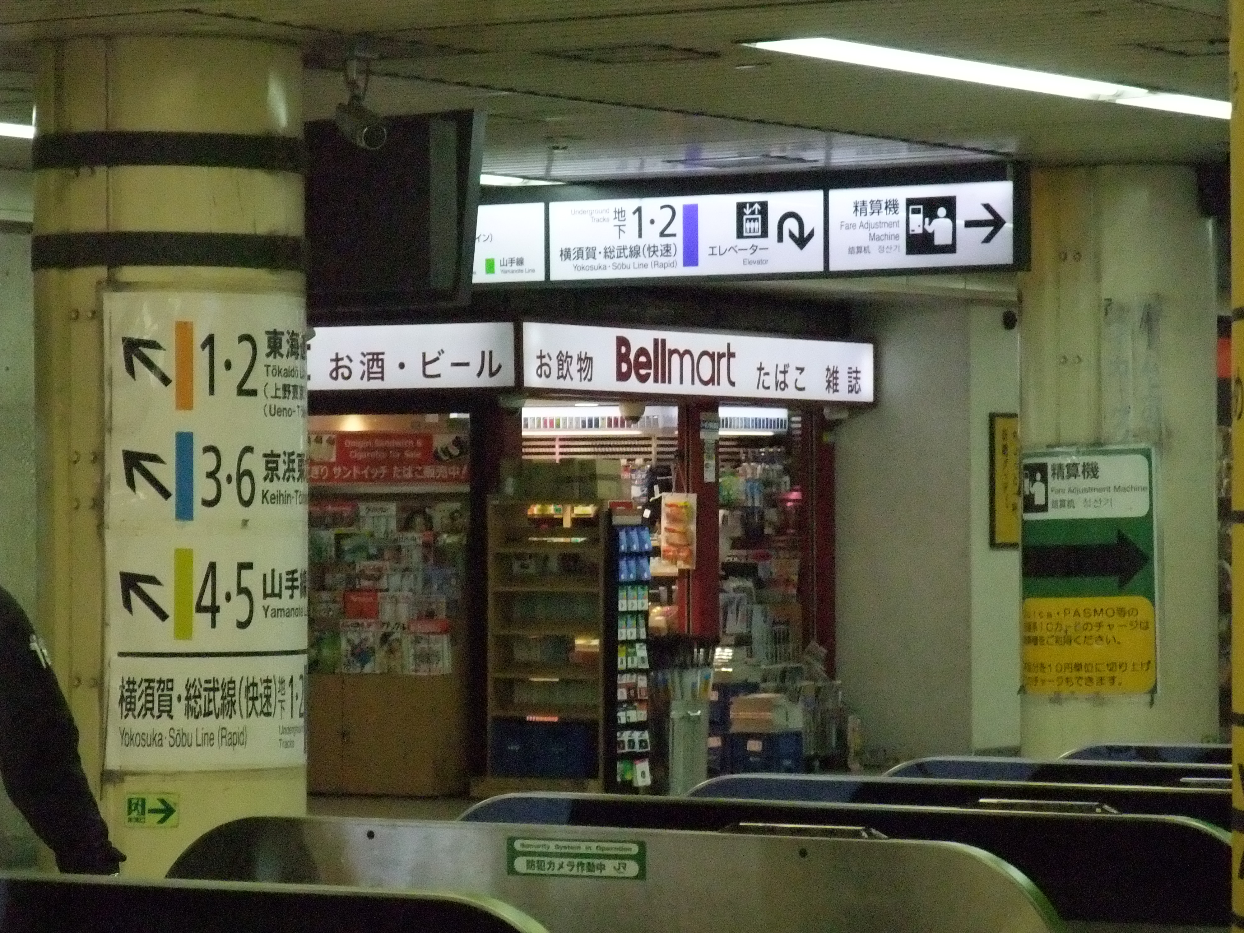 JR東日本の新橋駅構内（地下一階）に出店するJR東海系列の東海キヨスクによるベルマートを汐留口改札越しに見る。この場所は地上の新幹線高架橋用地に地下権があることからJR東海にも権利が生じており、出店が可能になった。 Fujifilm FinePix F100fd